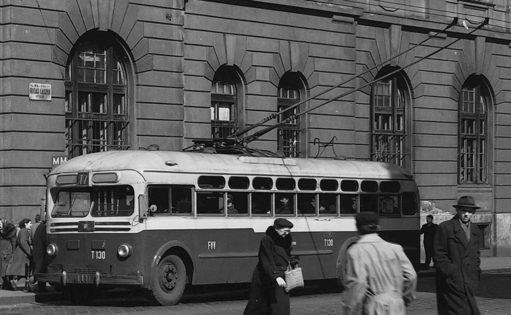 MTB–82 típusú szovjet trolibusz a budapesti 72-es viszonylaton